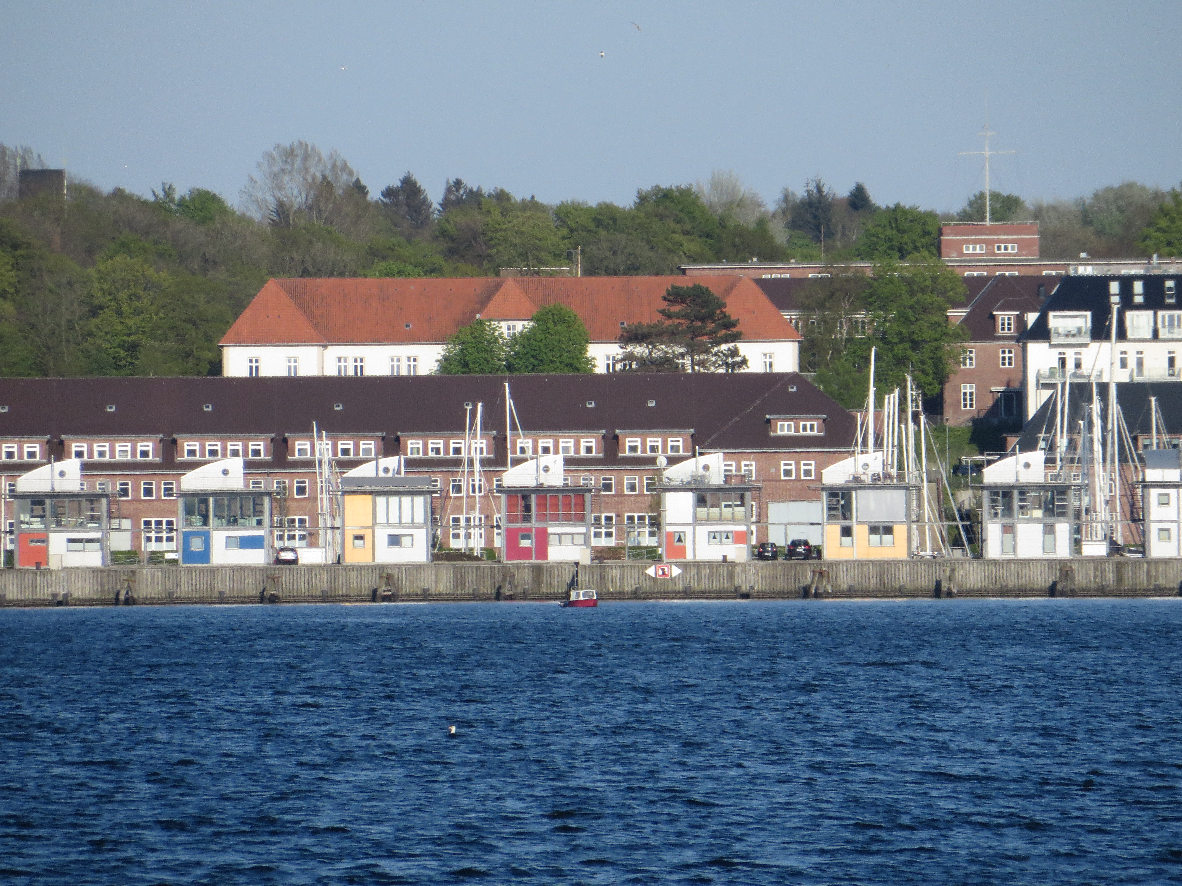 Sonwik mit Tirpitz-Kaserne der Torpedostation der kaiserlichen Marine (1901-1902), Flensburg 2014, Bild 01